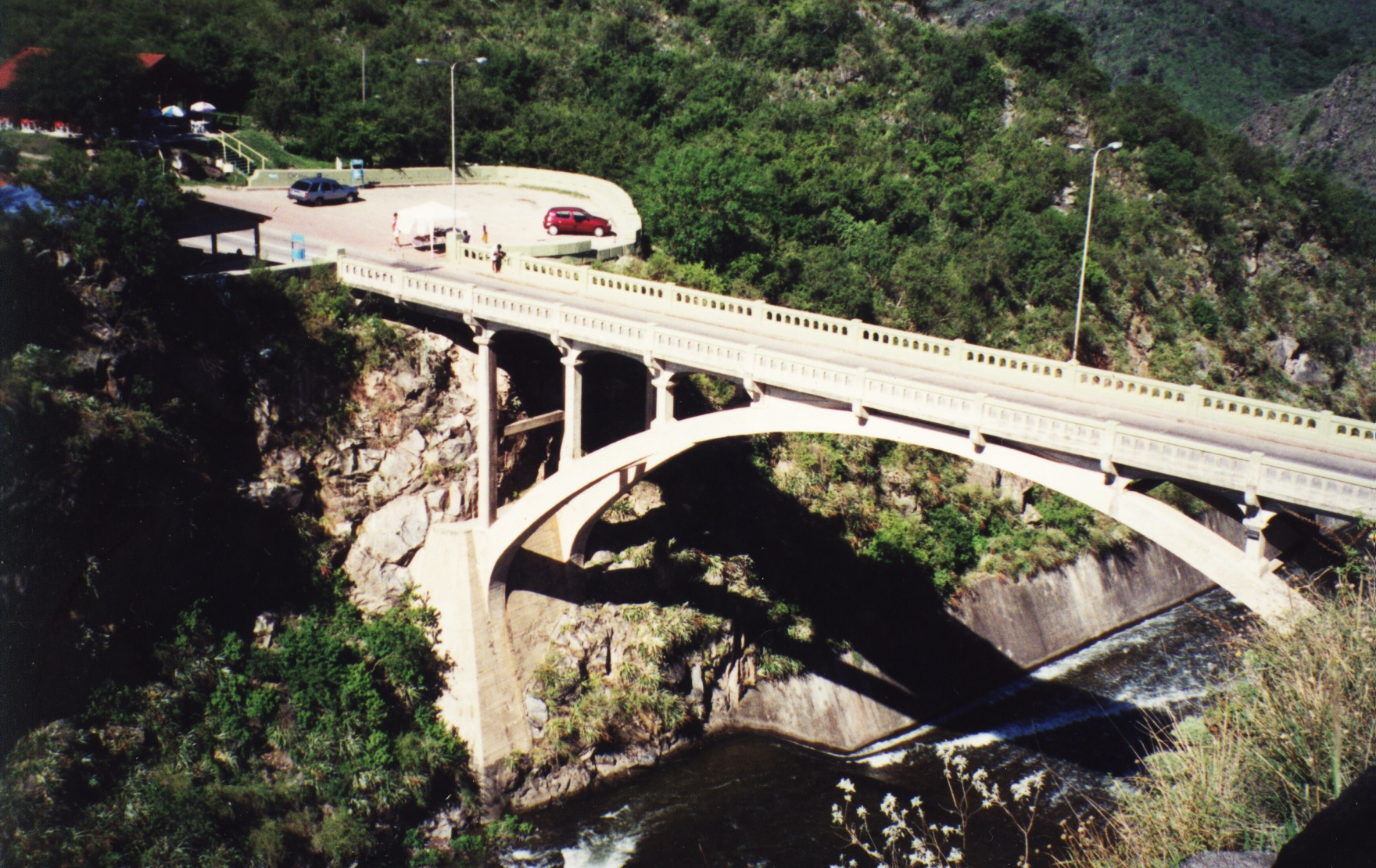 Puente de la Ruta Provincial 5 sobre el Embalse del Río Tercero, en la Provincia de Córdoba, Argentina.